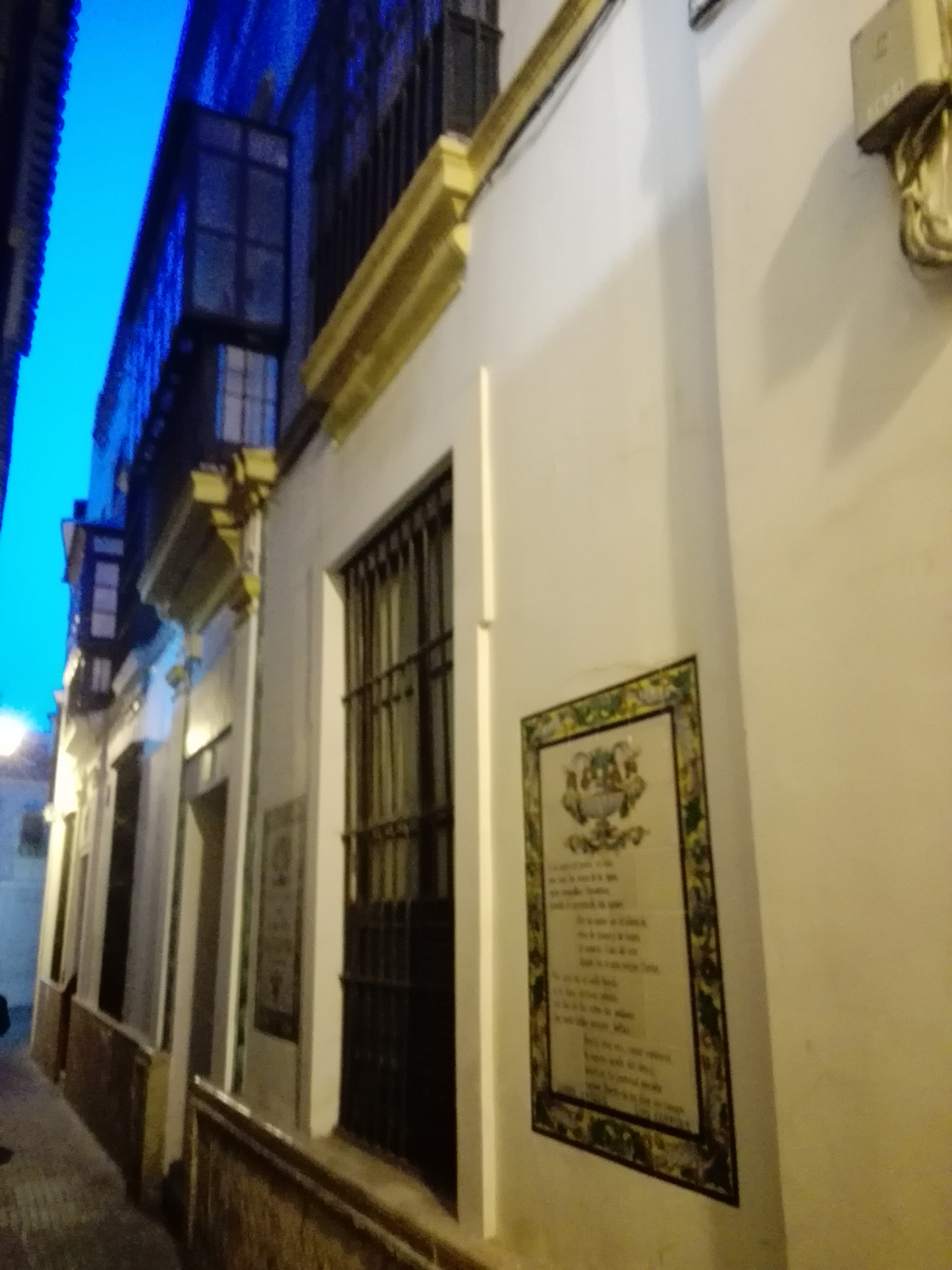 Fachada de la casa en la que vivió el poeta Luis Cernuda entre 1920 y 1928 en la calle Aire (Sevilla).